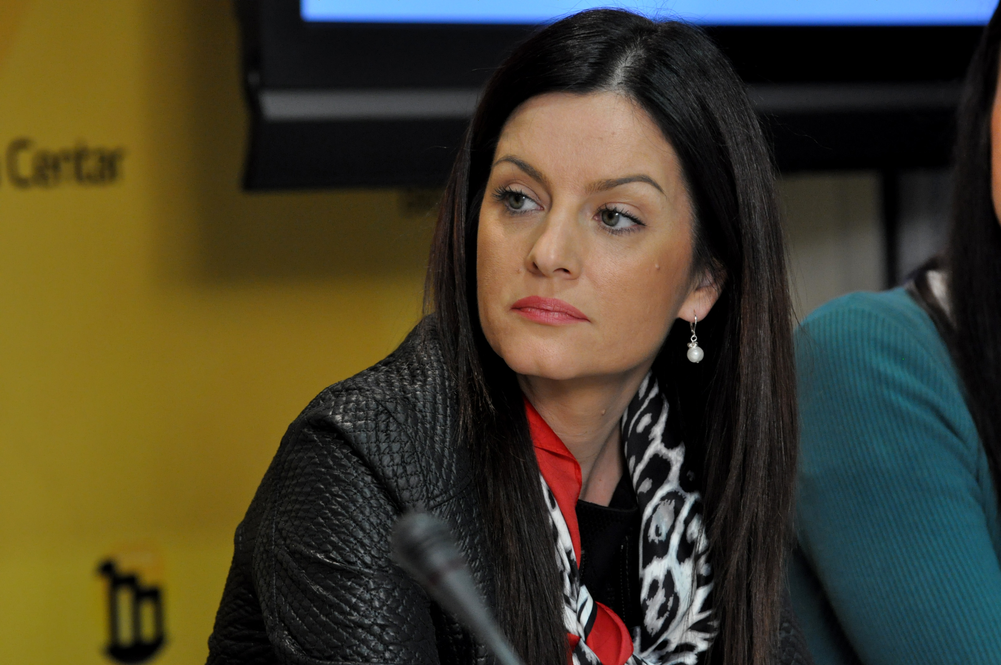 Марија Обрадовић српска политичарка